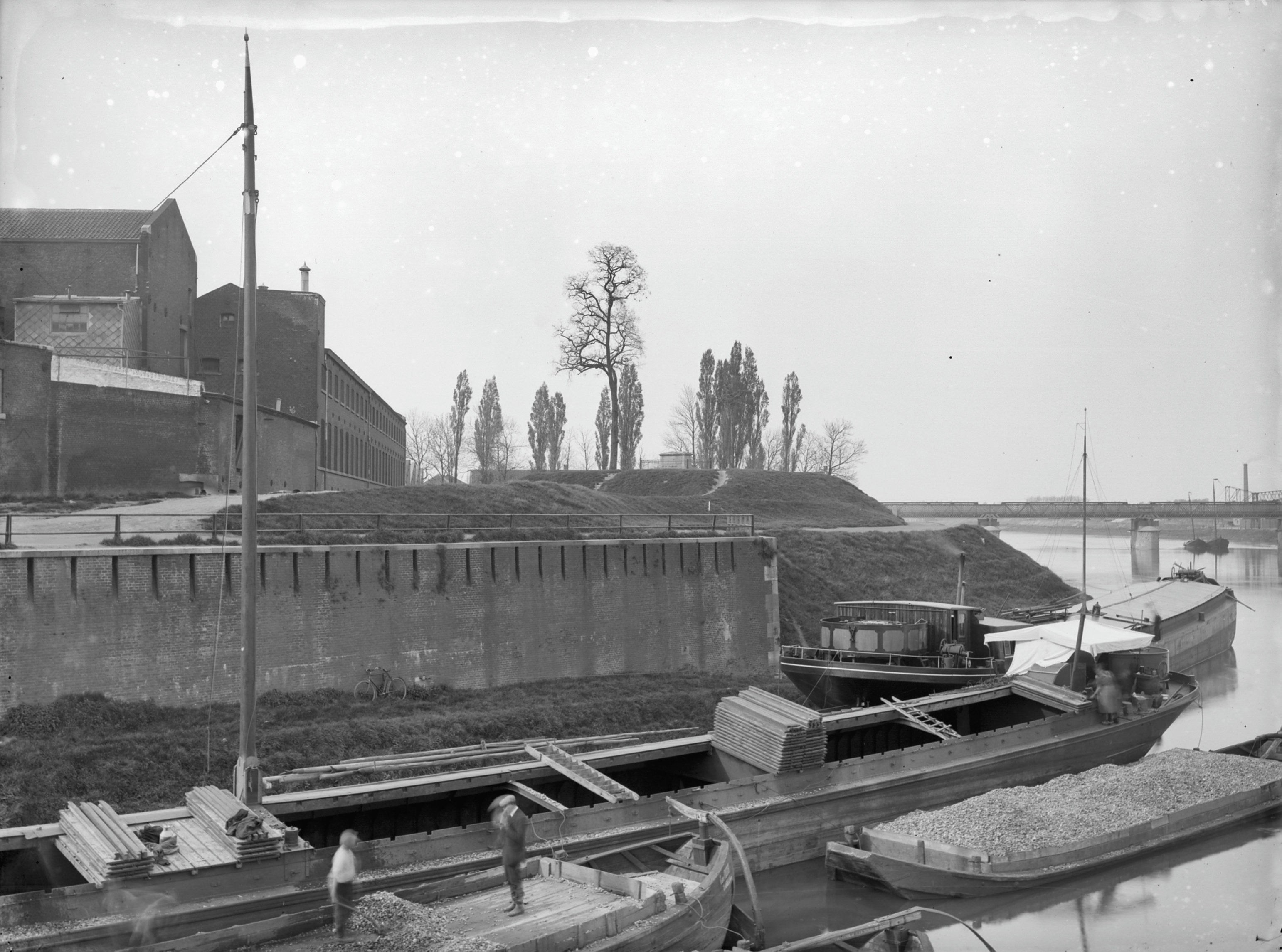 Vestingwerken: grafmonument Des Tombe op het voormalige Biesenbastion (bastion Des Tombe).